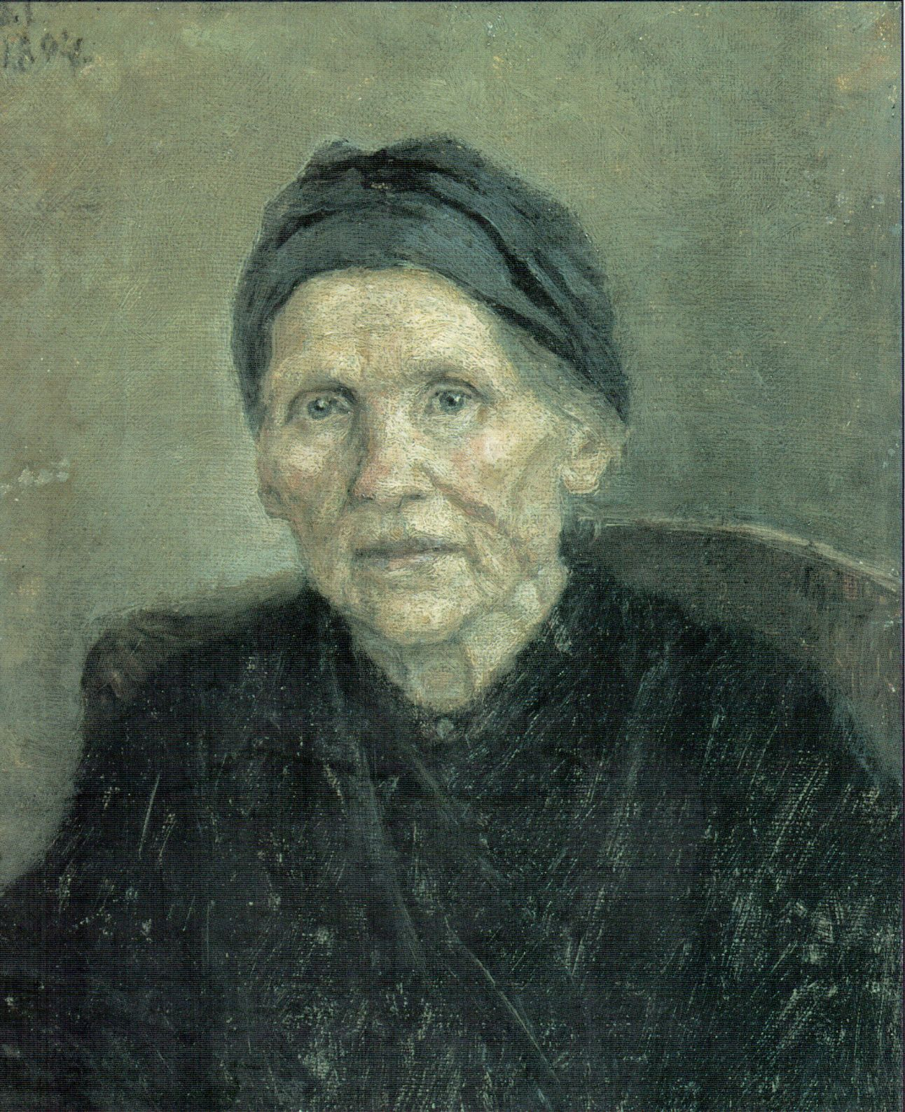 Портрет матери. Холст, масло. 29х23. Красноярский краеведческий музей.